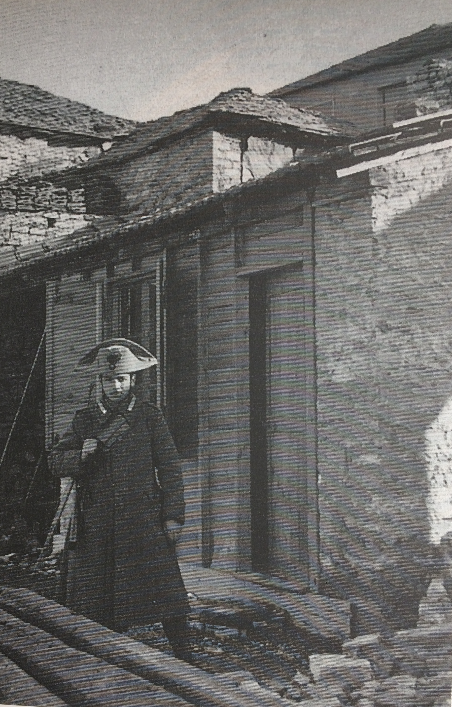 "La casetta dei carabinieri: era stata costruita sul lato ovest del nostro giardino quando la situazione in città era divenuta molto insicura. La casetta ospitava otto carabinieri incaricati di fare la guardia all'edificio della Banca e quindi del nostro appartamento."